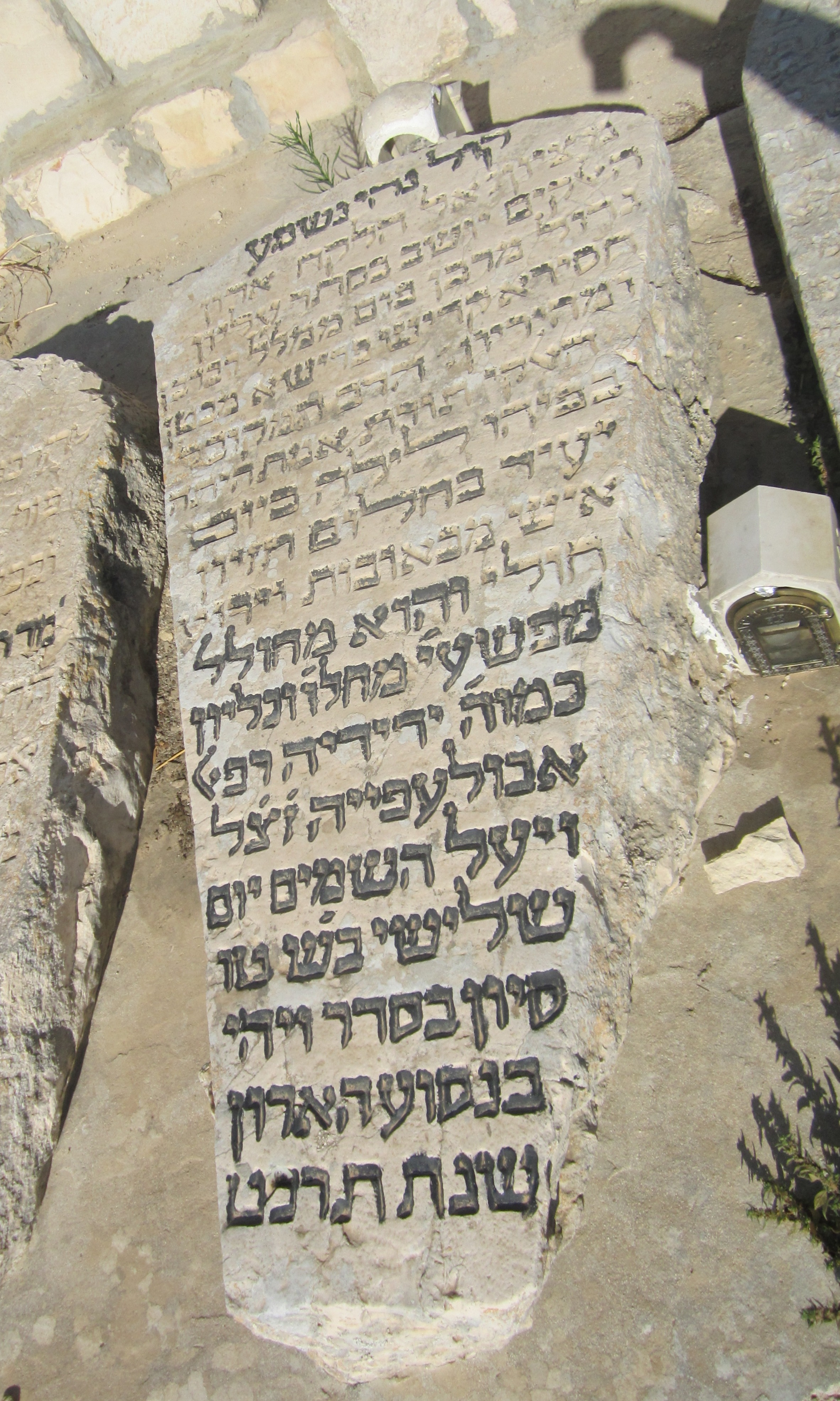 קבר הרב ידידיה רפאל אבולעפיה, ראש ישיבת המקובלים בית אל, בהר הזיתים